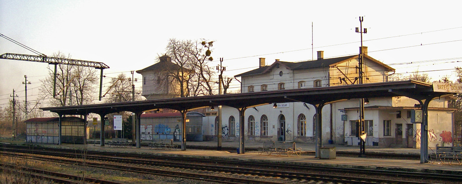 Stacja kolejowa Brzeg Dolny